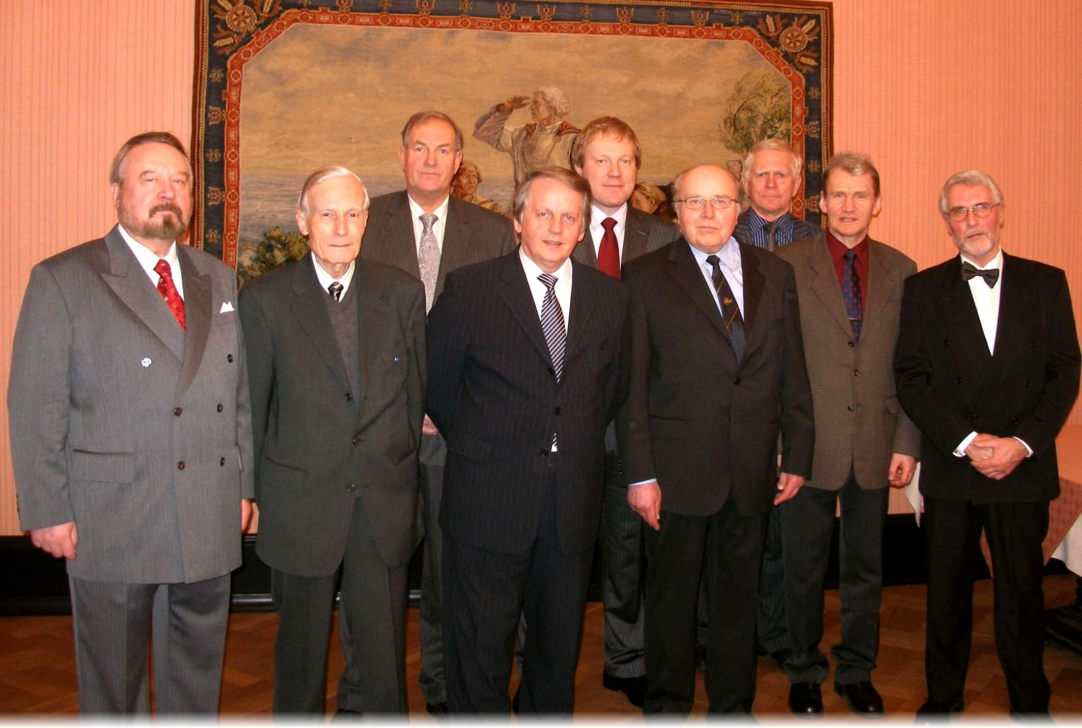 Taasiseseisvumise aegsed ja järgsed Riigikogu väliskomisjoni esimehed ja esimeeste asetäitjad Toompeal Kalevipoja saalis. Vasakult I rida: Ülo Nugis, Endel Lippmaa, Enn Eesmaa, Vello Saatpalu, Eino Tamm, Anti Liiv. II rida: Tiit Made, Marko Mihkelson ja Andres Tarand.